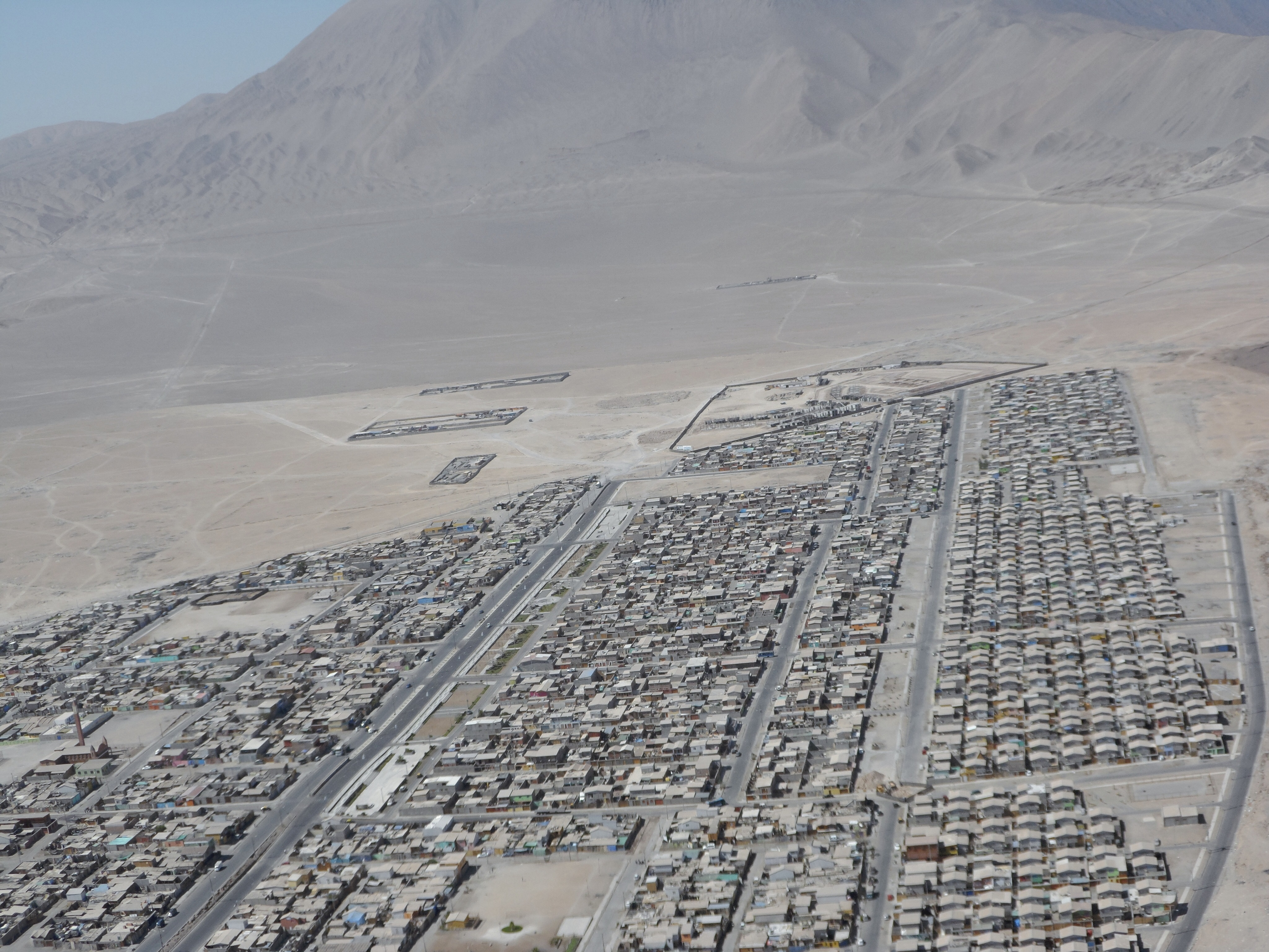 Vista de localidad de Alto Hospicio desde vuelo en parapente. Iquique. I región.